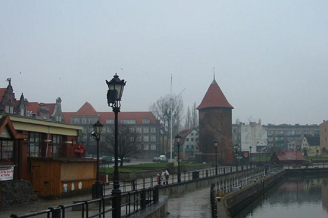 Rybackie Pobrzeże, Baszta Łabędź i fragment Targu Rybnego Gdańsku, przed zabudową wschodniej części. Camera: Canon PowerShot A40 License on Flickr (2011-01-24): CC-BY-2.0 Flickr tags: Gdansk, December, 2005